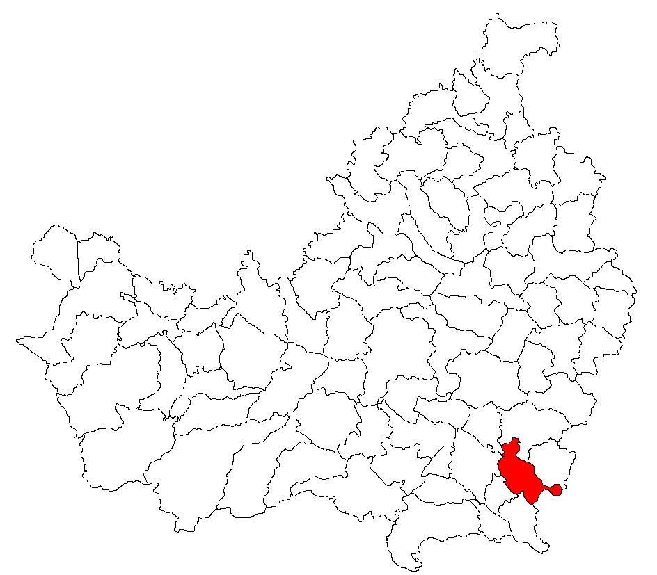 Comuna Viisoara, judeţul Cluj